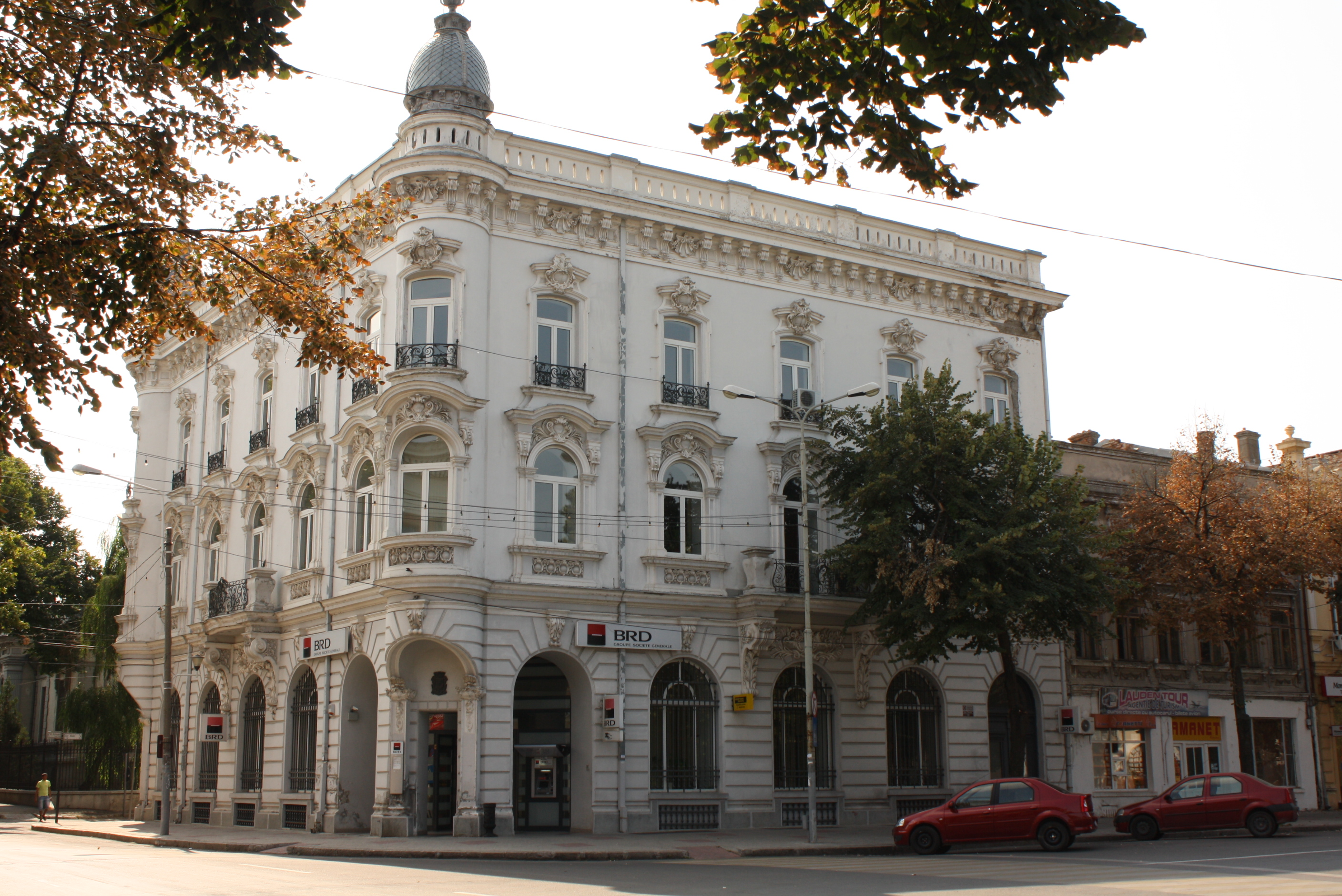 Hotel " Danubiu"(1890), azi BRD Groupe Société Générale, Piața Traian 12, Braila